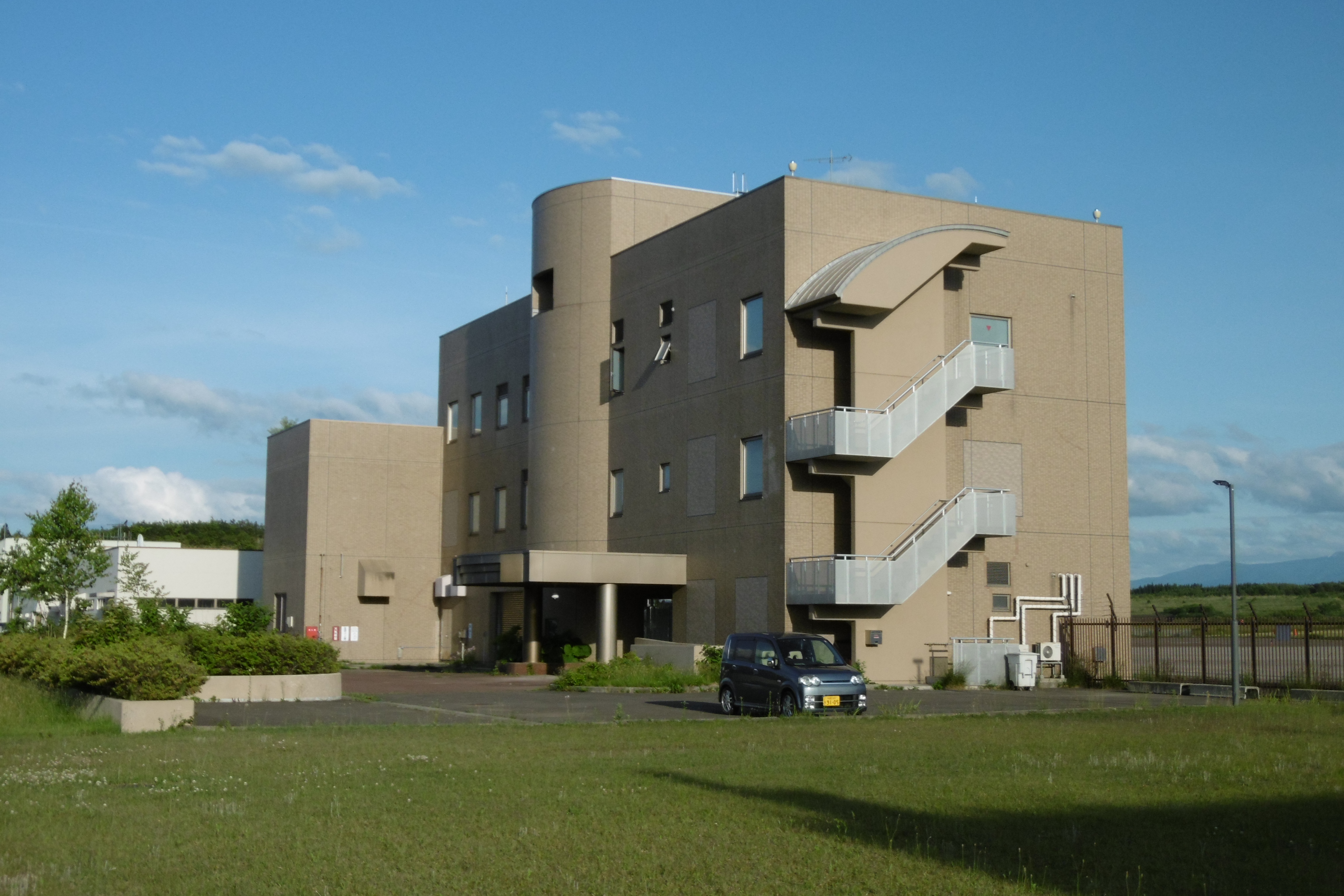 気象庁 大館能代航空気象観測所